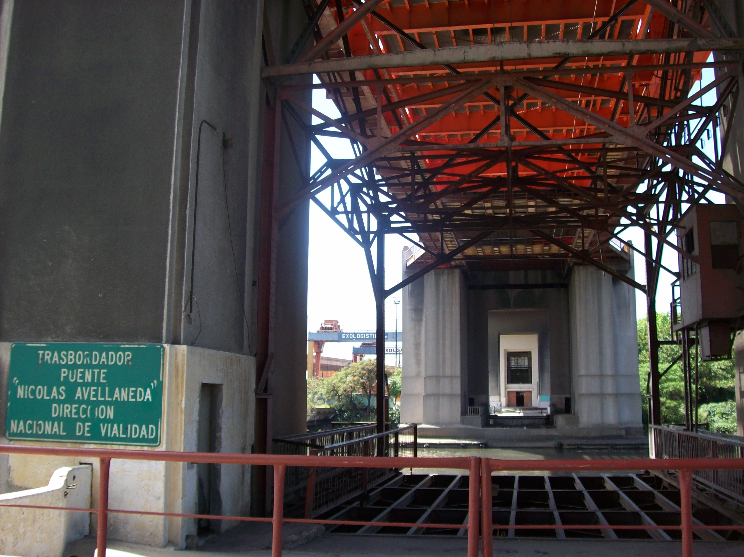 Infraestructura del Nuevo Puente Nicolás Avellaneda. Se pueden apreciar los cuatro pilares sobre el Riachuelo.